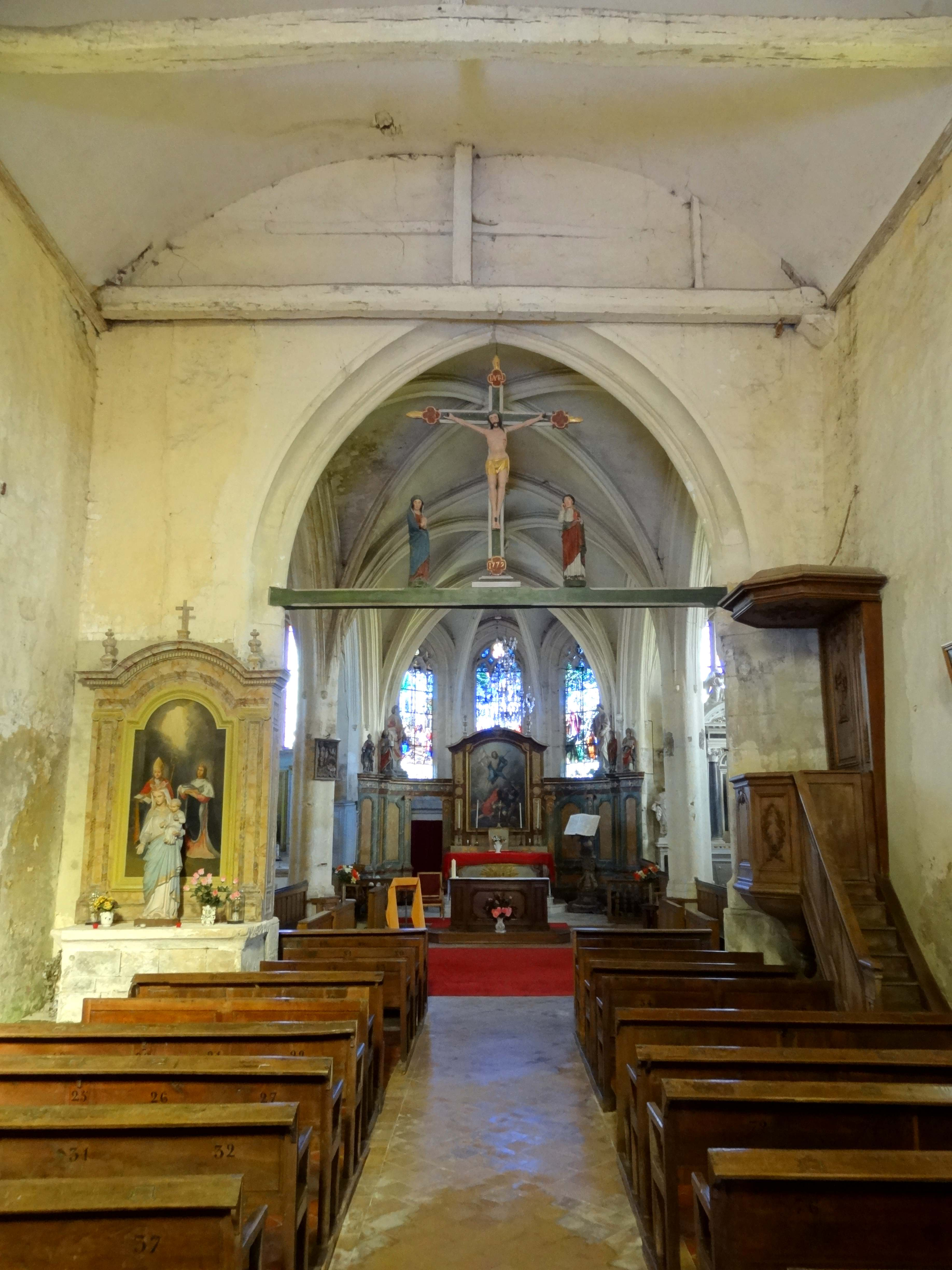 Intérieur de l'église - voir titre.